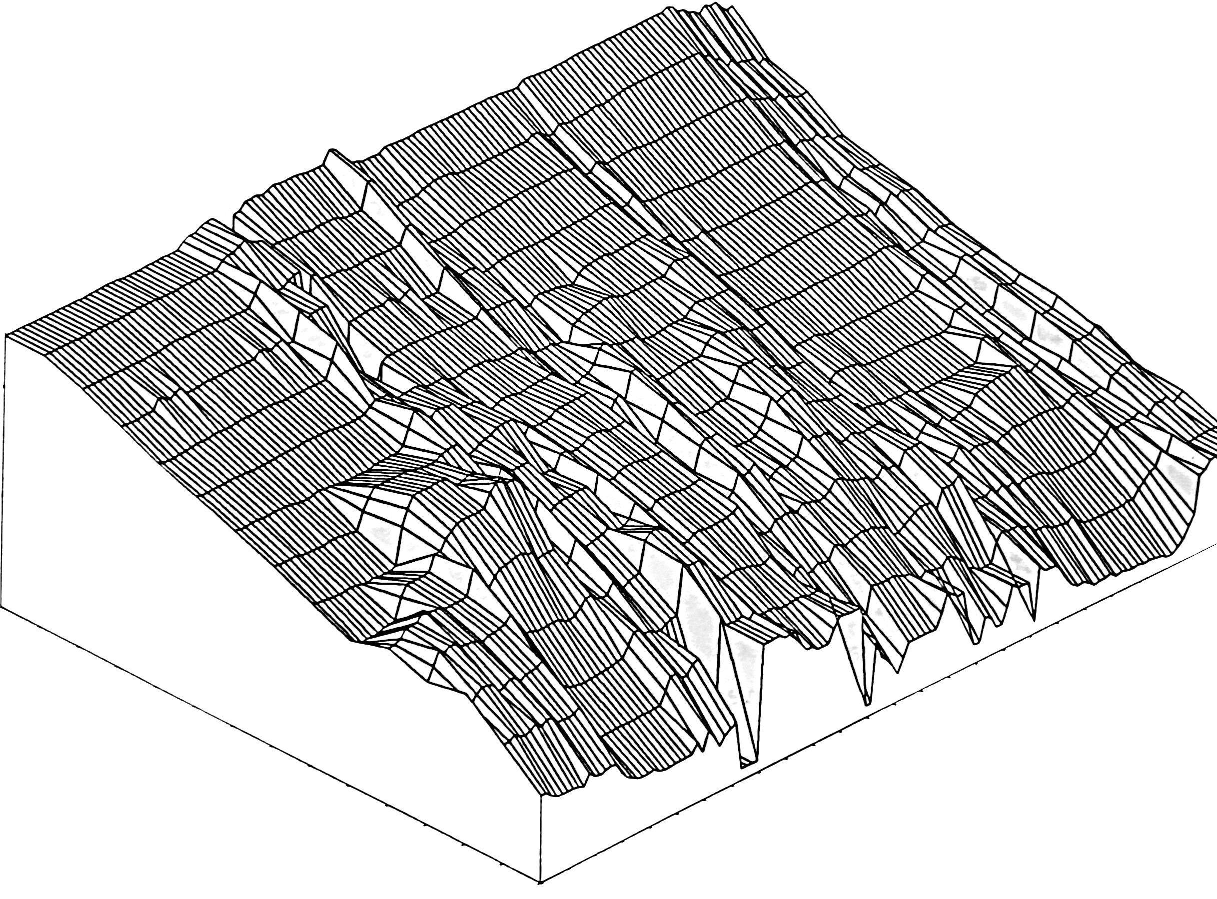 Eigen gemaakte media o.b.v. zelf ingewonnen strandraaihoogtegegevens. Helaas waren het oude gegevens, alleen als papieren exemplaar beschikbaar, en is er een dig. camera aan te pas gekomen om dit te digitaliseren.